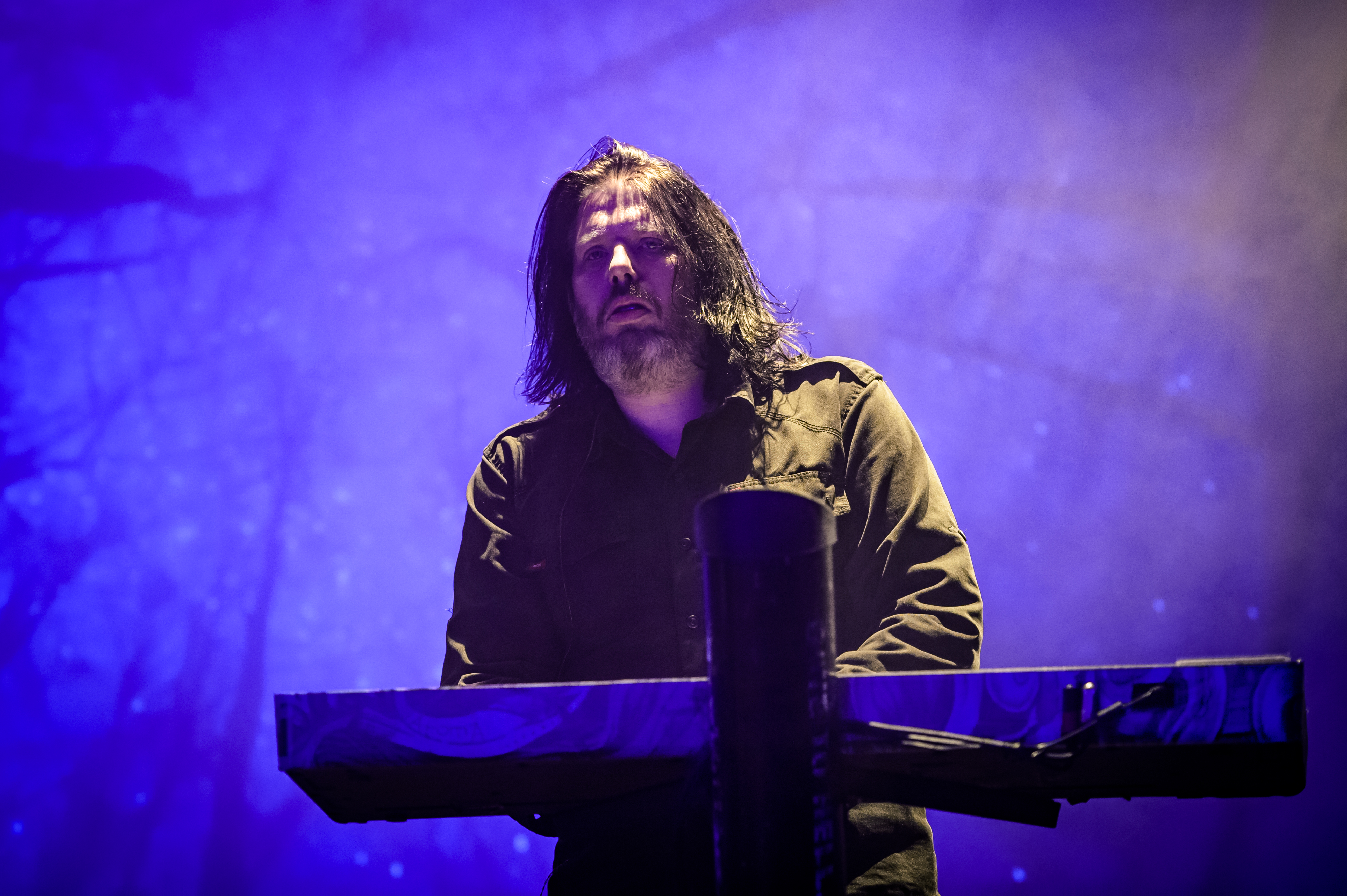 'Dong Open Air 2017; Neukirchen-Vluyn': 'Dark Tranquillity'